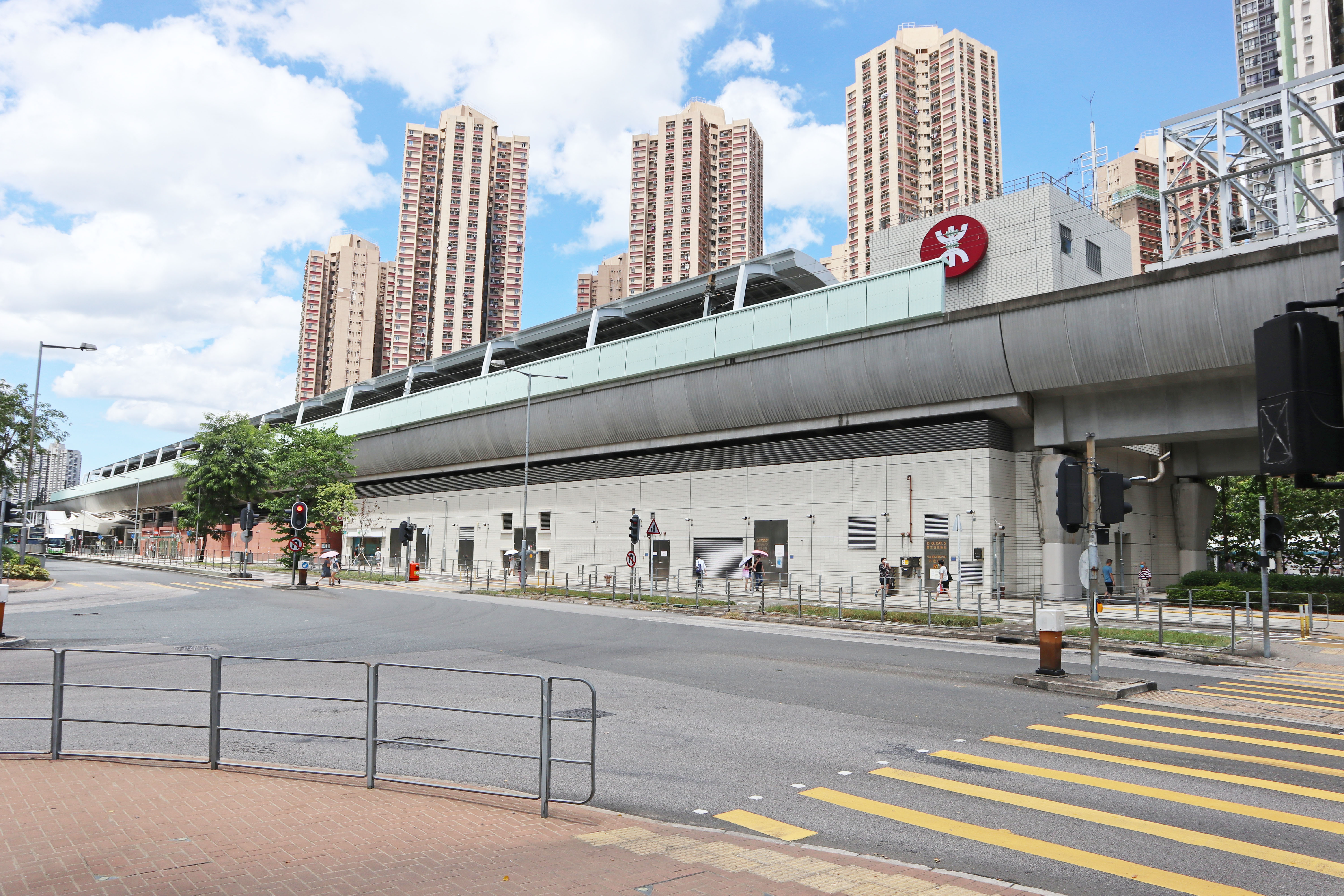 港鐵第一城站外觀